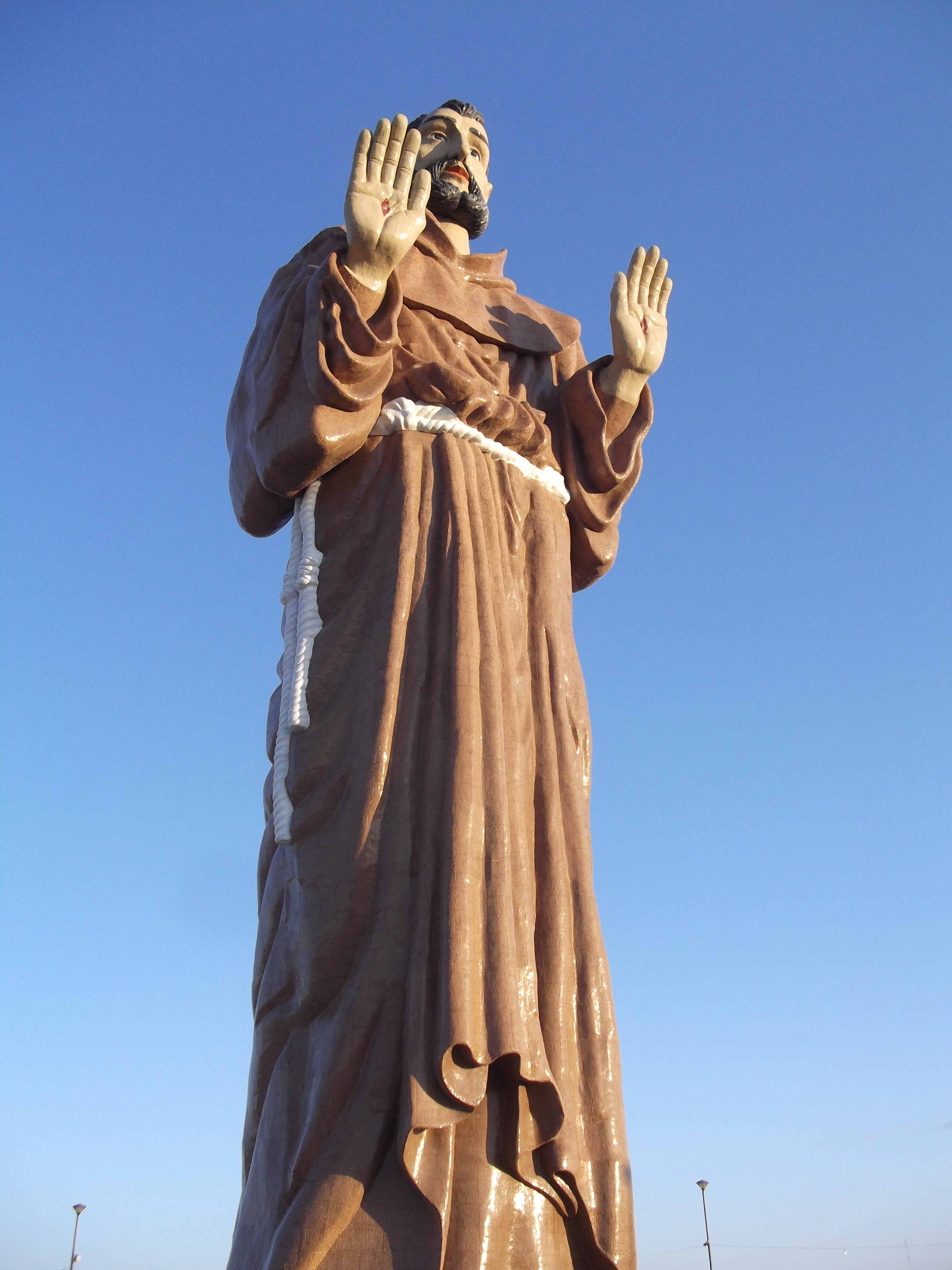 Estátua Gigante de São Francisco, Canindé, Ceará, Brasil